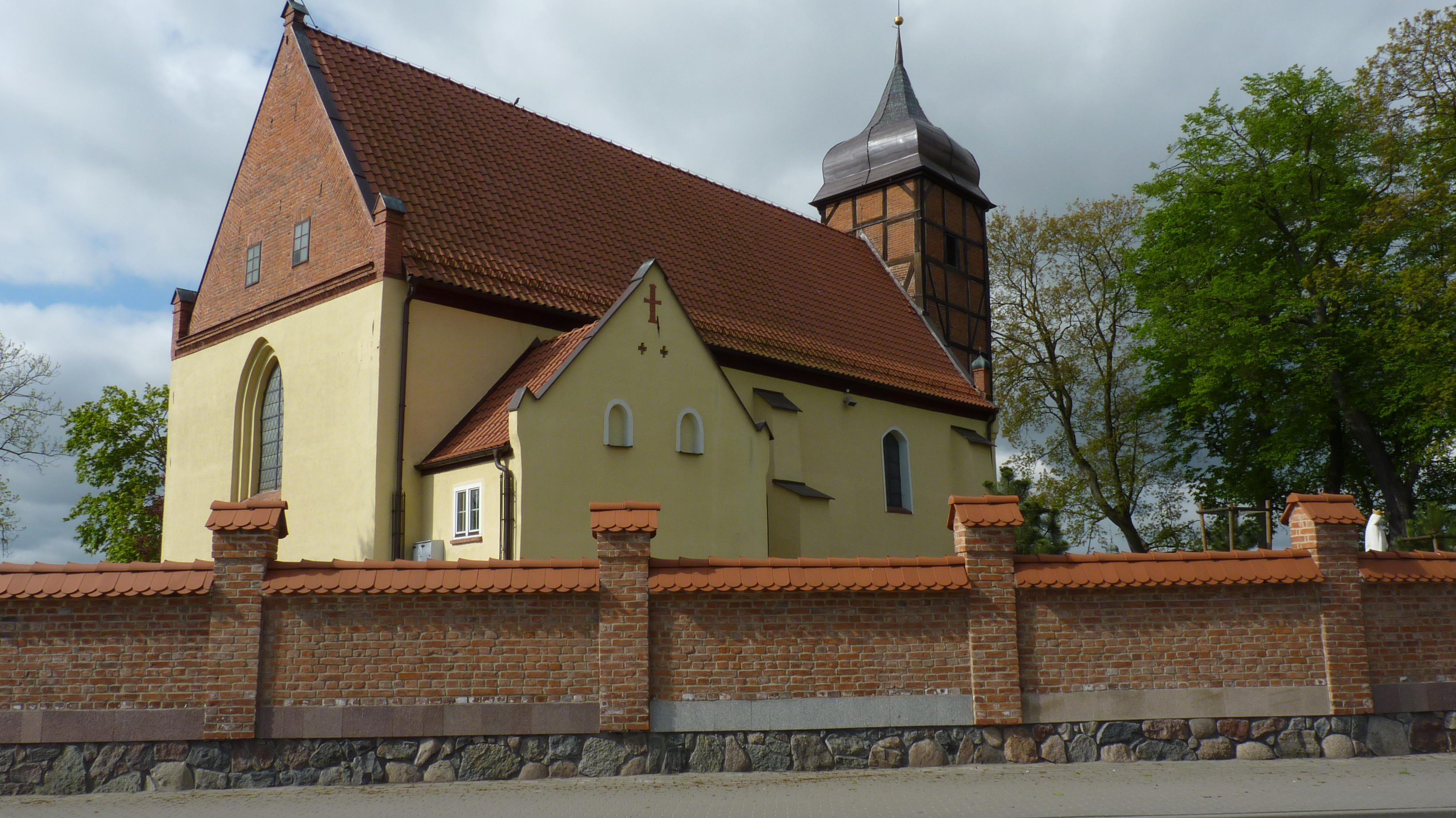 Żukowo, kościół fil. p.w. św. Jana Chrzciciela, 1604